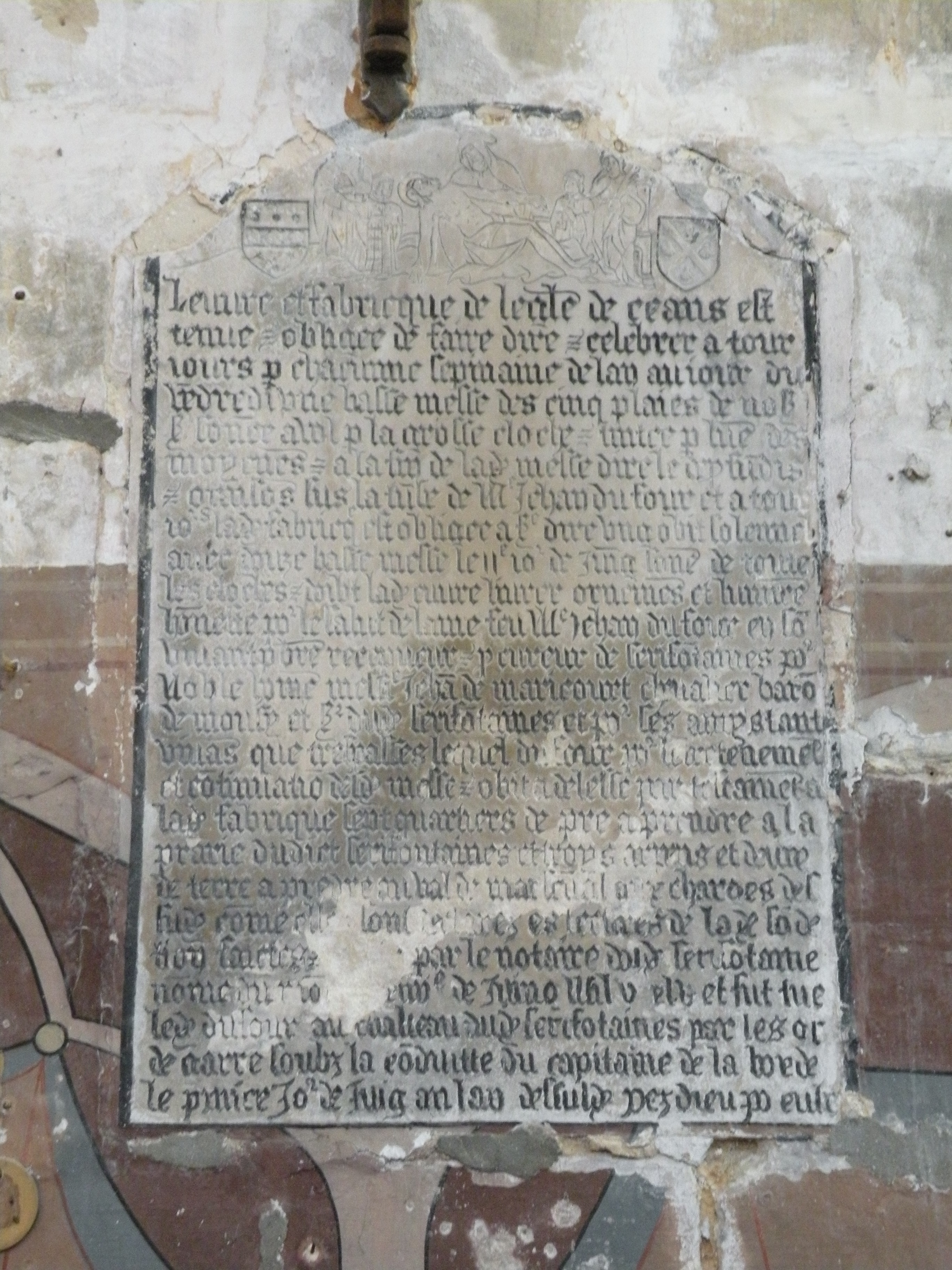 Église Saint-Denis de Sérifontaine dalle commémorative de fondation par Jean Dufour et Jean de Maricourt : " L'oeuvre et fabrique de l'église de ceans est/tenue et obligée de faire dire et celebrer a tour/jours pour chacune cedmaine l'an au jour du/vendredi un basse messe des cinq plaies... Etsonner... (par) la grosse cloche et... Pour Dieu des/... Et à lafin deladite messe dire le de Profundis/et oraisons sur la (tombe) de mr Jehan du four et à tout/... La dite fabrique est obligée a savoir dire un obit solennel/avec douze basse messe le IIe jour de juin sonner de toute/les cloches et doibtdite... Ornemens et... / ... Messe pour le salut de l'âme feu jehan Dufour en son/vivant pretre receveur et p... De Cerifontaine par/noble homme messire Jehan de Maricourt chevalier baron/de Mouy et.. ; dudit Cerifontaines et par ces... Tant/vivants que trespasses le quel du... Et de ladite messe et obit... / ladite fabrique sept quartiers de pre à prendre a la/prairie dudit cerifontaines et troys arpents et deux : de terre à prendre au Val de Mar... A charges de / eulx comme elle... / ... Par le notaire dudit Cerifontaines/... Et fut tué/ledit Dufour au château dudit Cerifontaines par le s... De... Souls la conduite du capitain de la... / le Prince.... Priez Dieu pour eulx ".